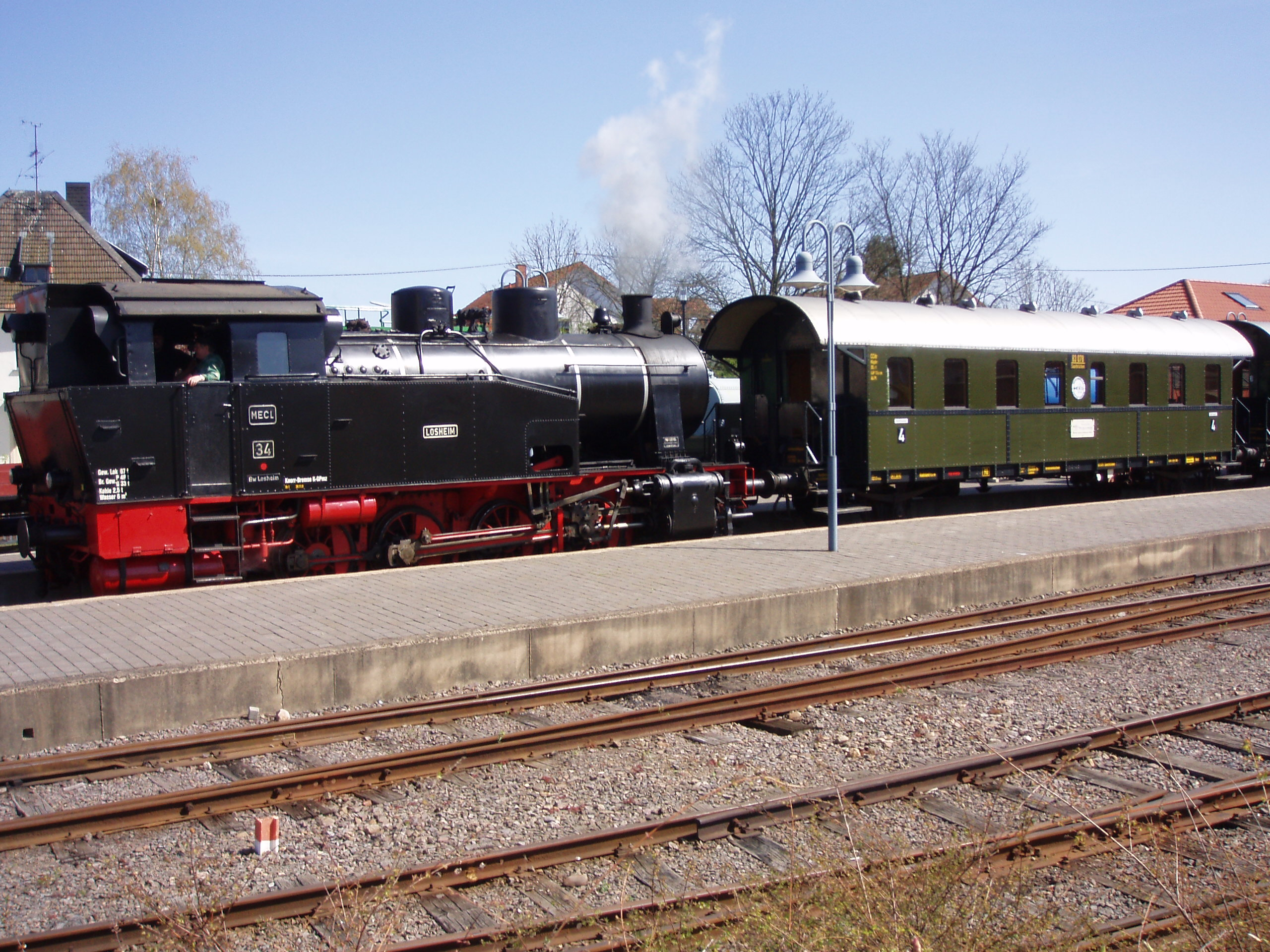 Museumszug in Losheim. Loc: ex Saarberg 34 (D-n2t, Henschel, Baujahr 1948)